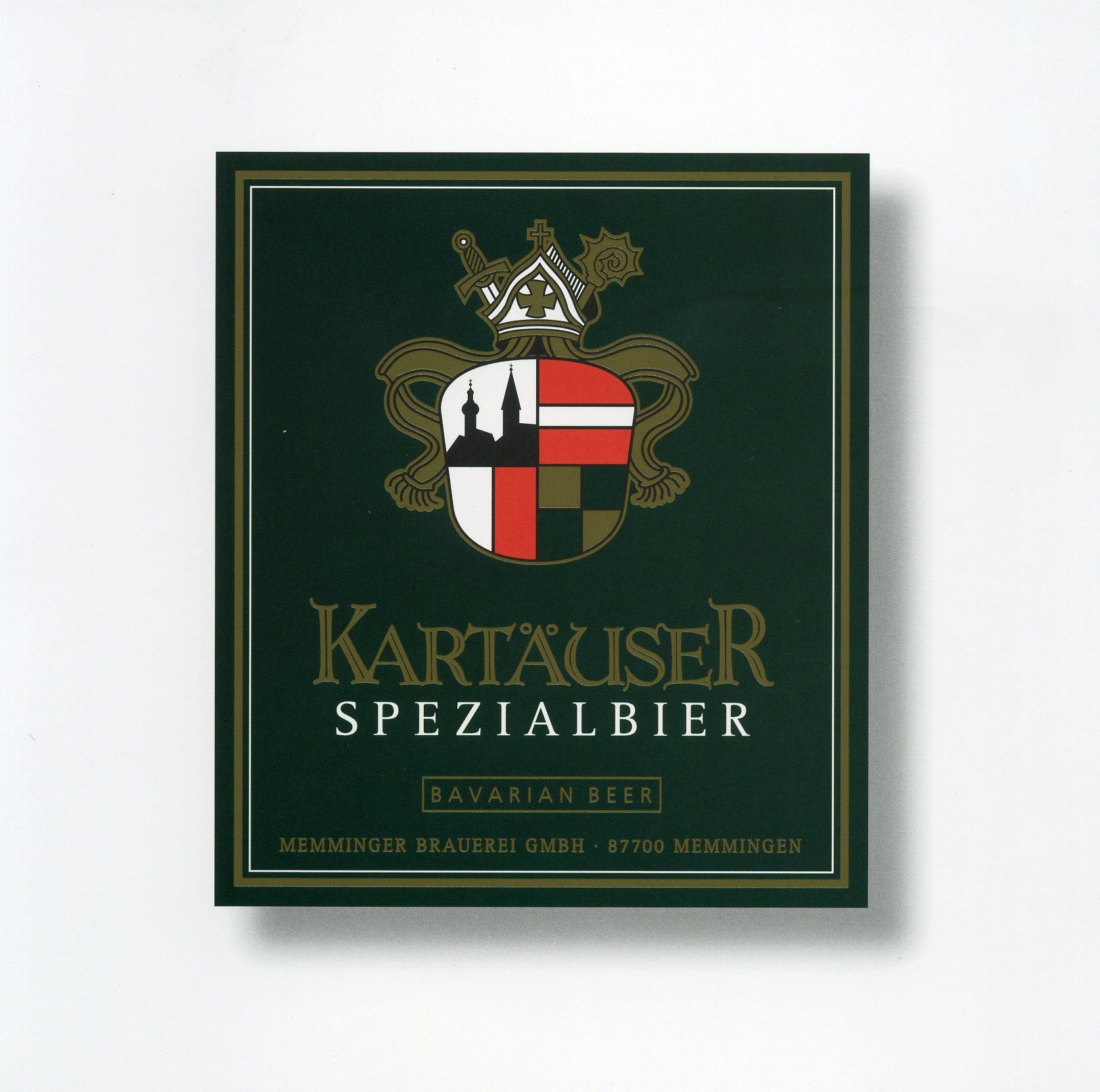 Etikett des Kartäuser Spezialbier, einer Bierspezalität der Memminger Brauerei, gebraut nach einem Kartäuserrezept der Reichskartause Buxheim